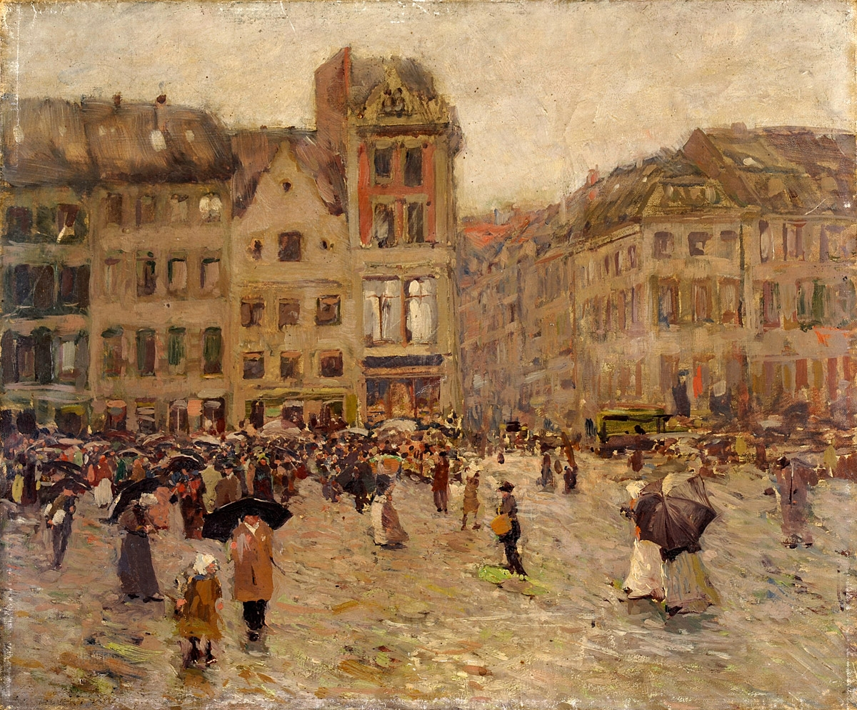 Der Burgplatz an einem Regentag. Öl auf Leinwand, 38 x 46 cm. Düsseldorfer Schule um 1900